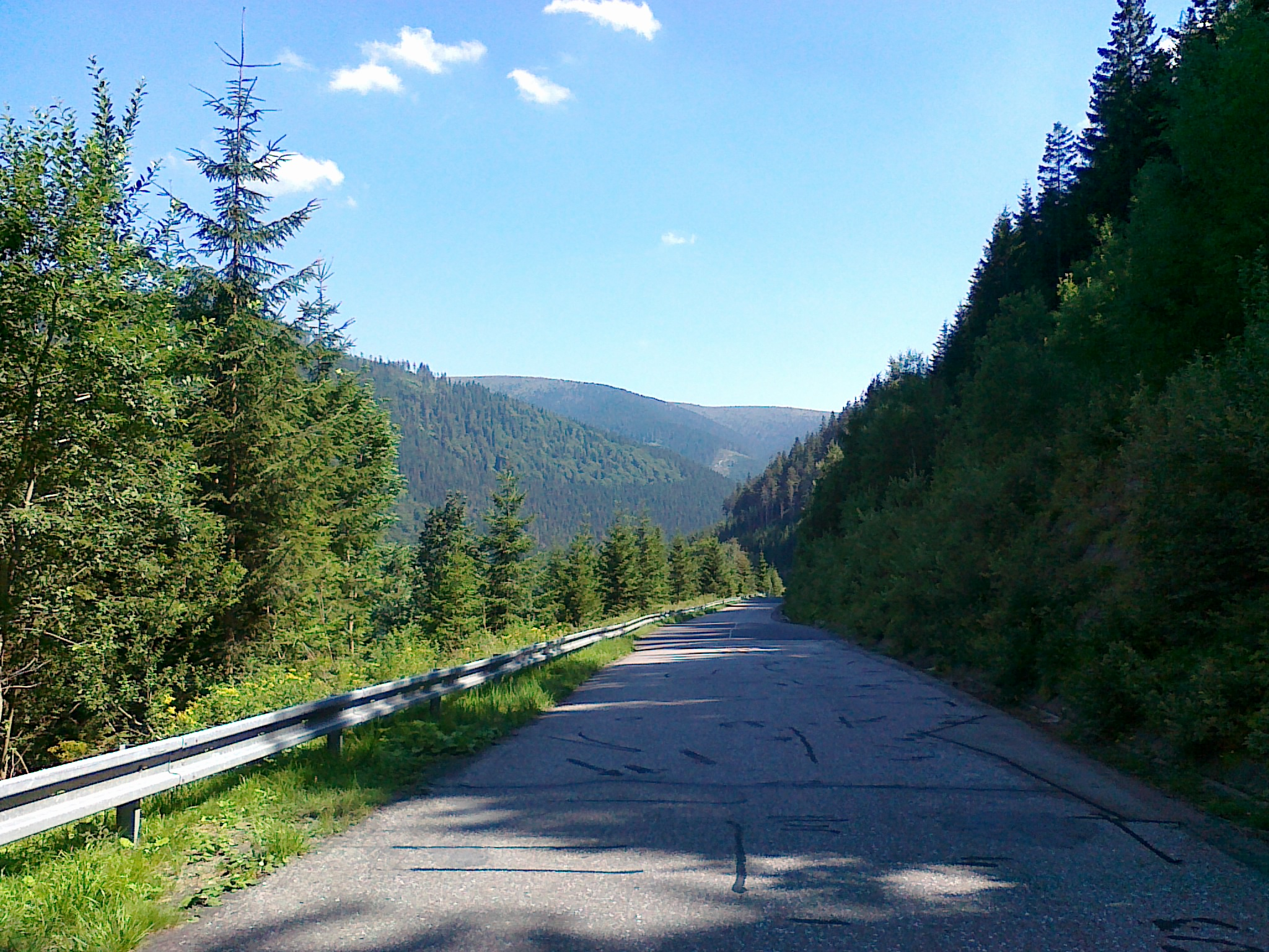 Widok ze zbocza góry Velká Jezerná na górę Vysoká hole i szczyt Kamzičník, z lewej zbocze Divoký kámen